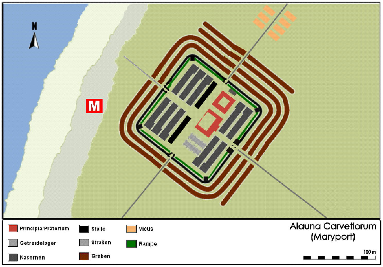 Befundskizze des Kastell Alauna, Maryport (GB)